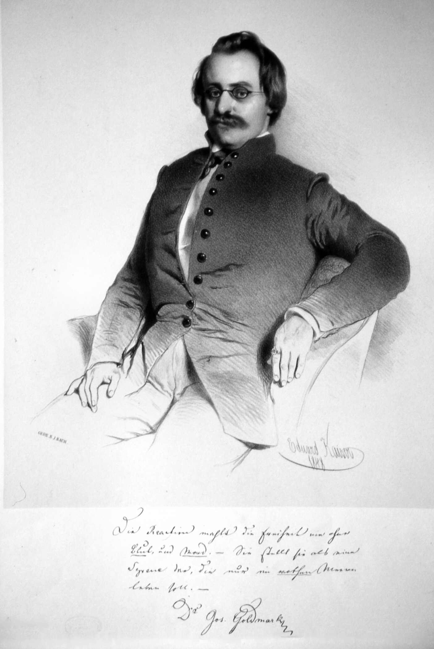 Josef Goldmark (1818-1881), Dr. med, Chemiker, 1848 Revolutionär und Abgeordneter. Entdecker des roten Phosphors. Lithographie von Eduard Kaiser, 1848